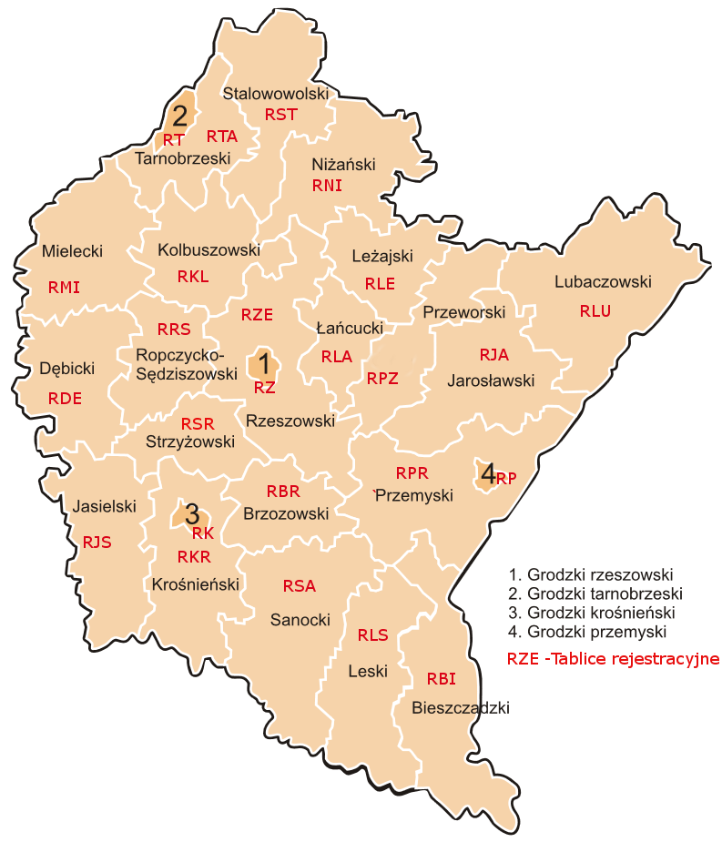 Powiaty i tablice rejestracyjne w województwie podkarpackim